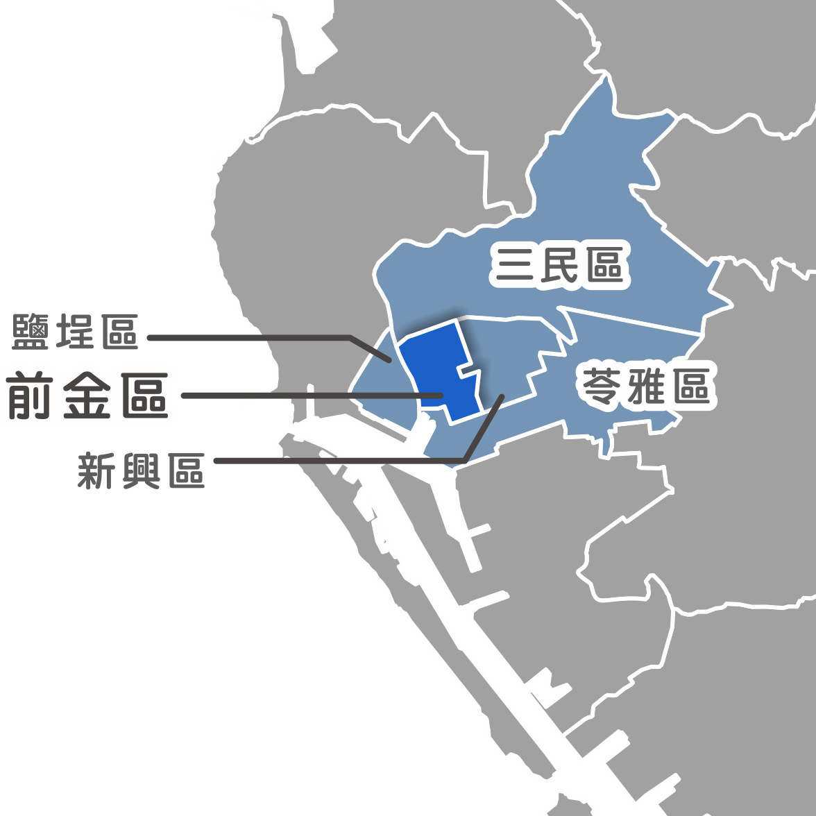 前金區相對位置